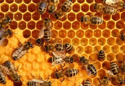 Abejas.